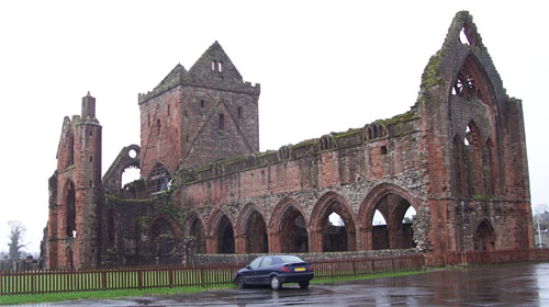 Sweetheart Abbey, Dumfries and Galloway (Scotland)